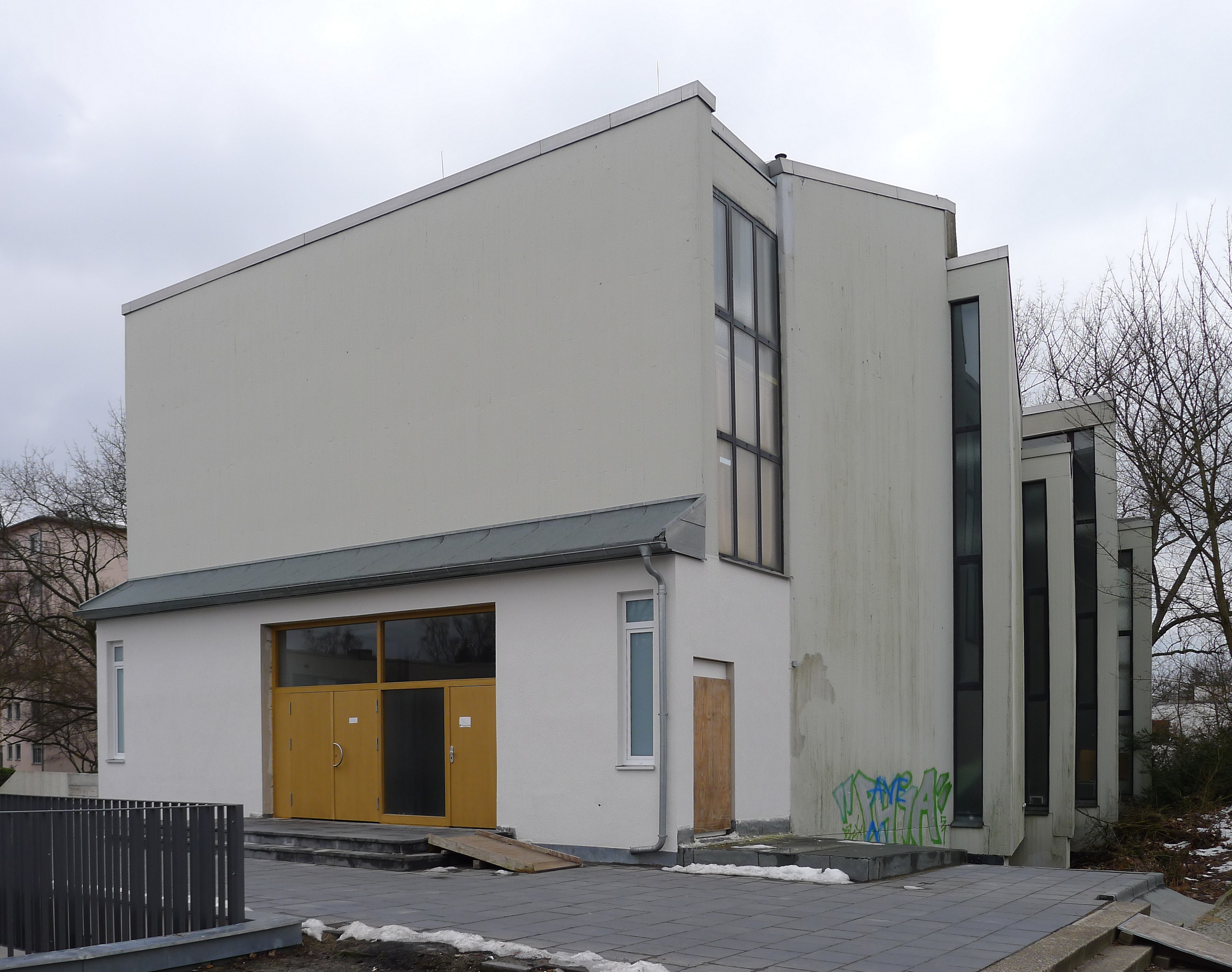 Straßenseite des Kirchenschiffs mit Portal